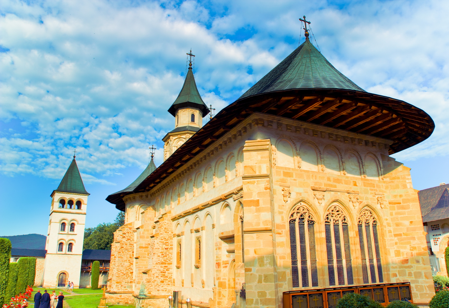 Maiestuoasă, Mănăstirea Putna crează sentimentul că va dăinui încă alte multe sute de ani.